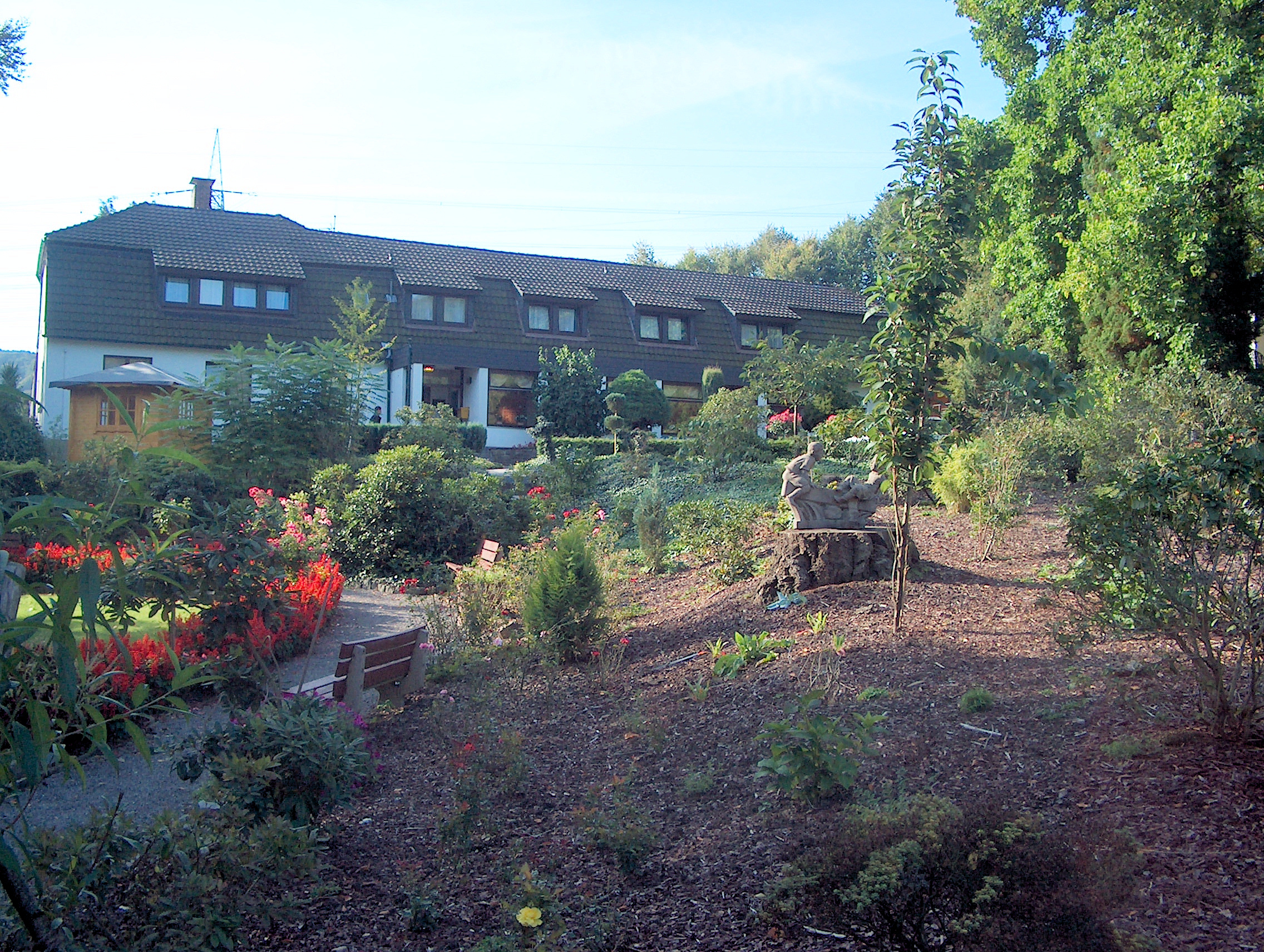 Haus Herchen, Wuppertaler Stadtwerke